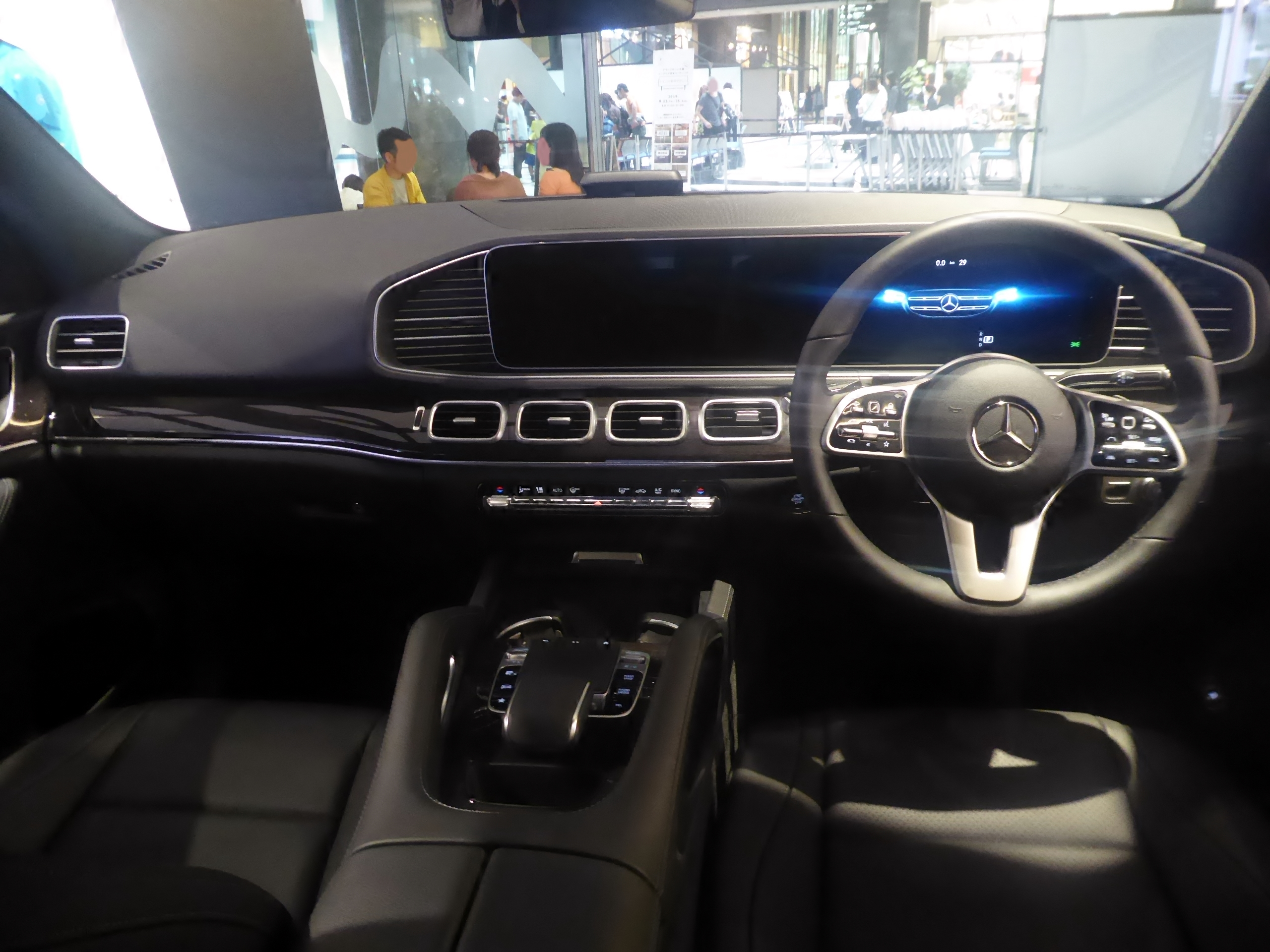 W167系メルセデス・ベンツ・GLE300d 4MATICのインテリアを撮影。